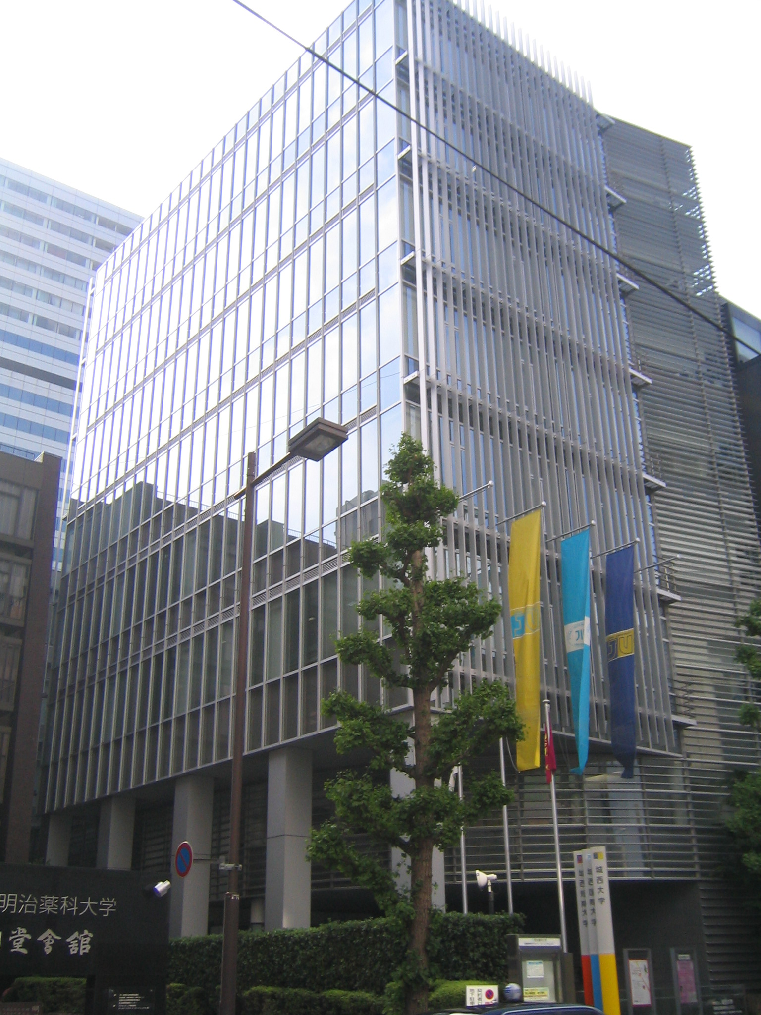 城西大学坂戸キャンパス